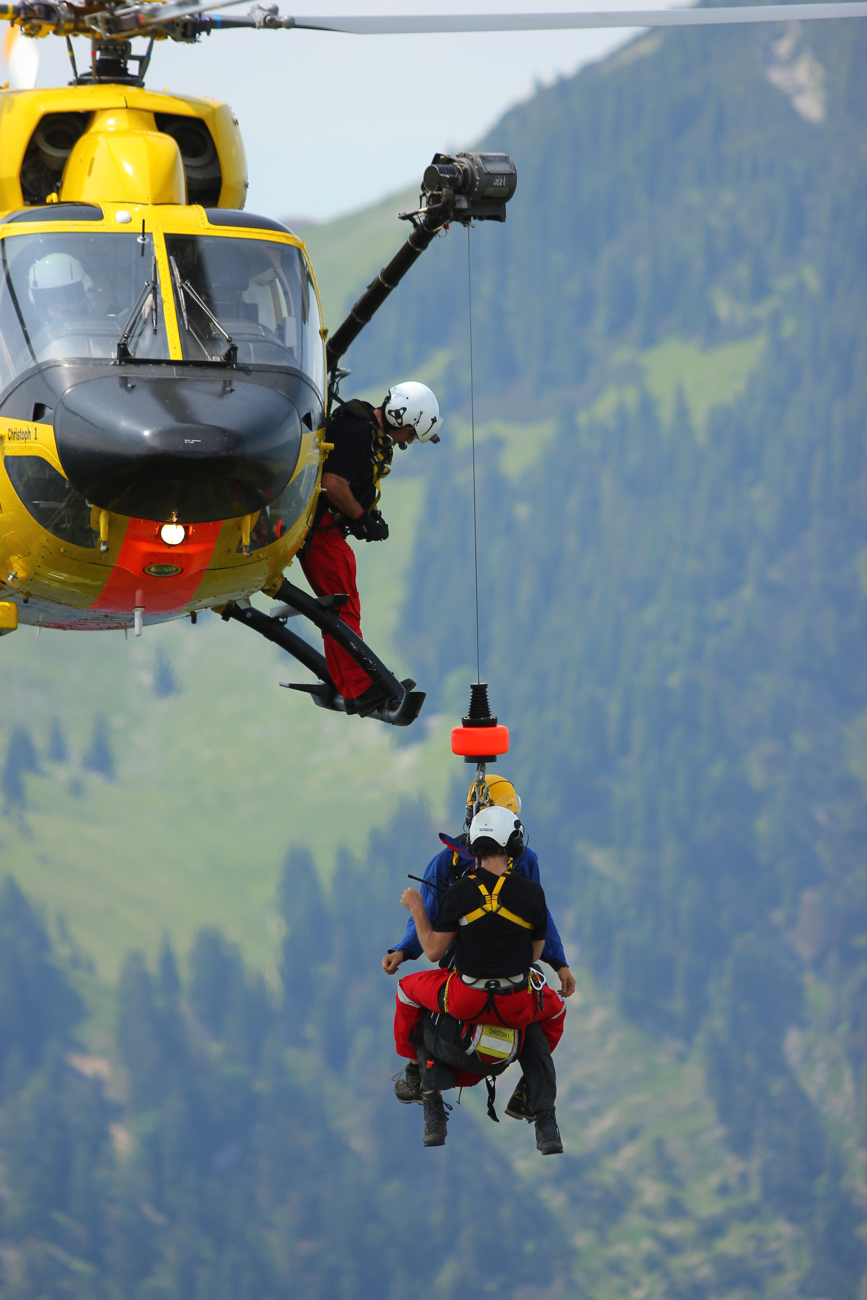 Bergrettung am Bodenschneid-Gipfel der 'Christoph 1', D-HMUM.